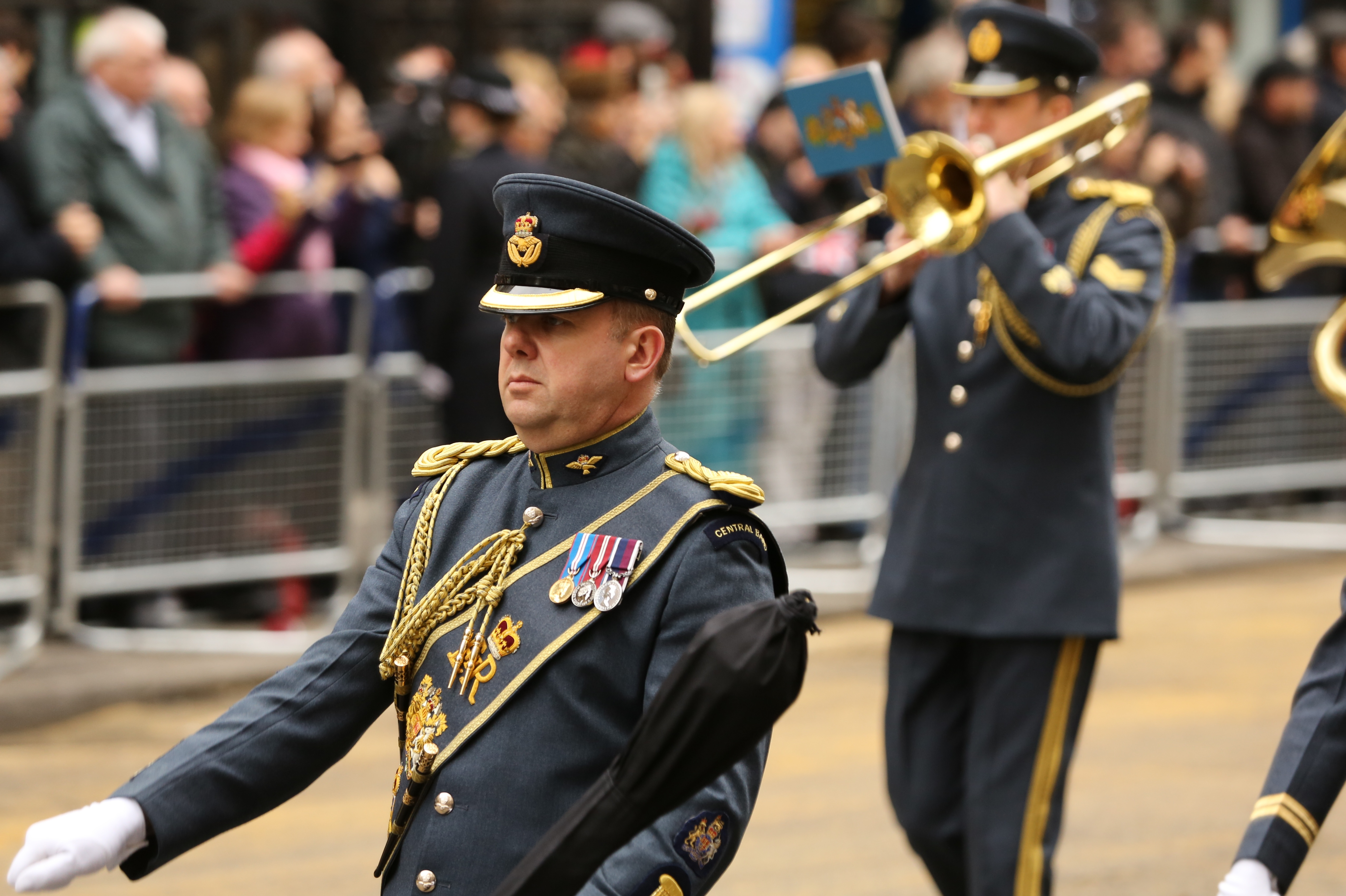 RAF Bandleader